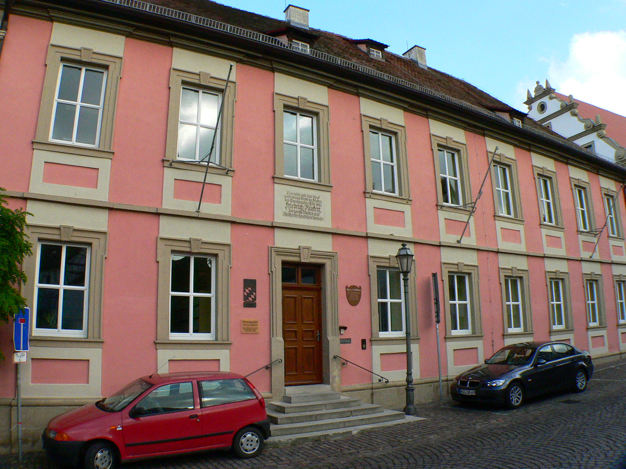 "Amtshaus" in Ebern - Eltern- und Wohnhaus Friedrich Rückerts